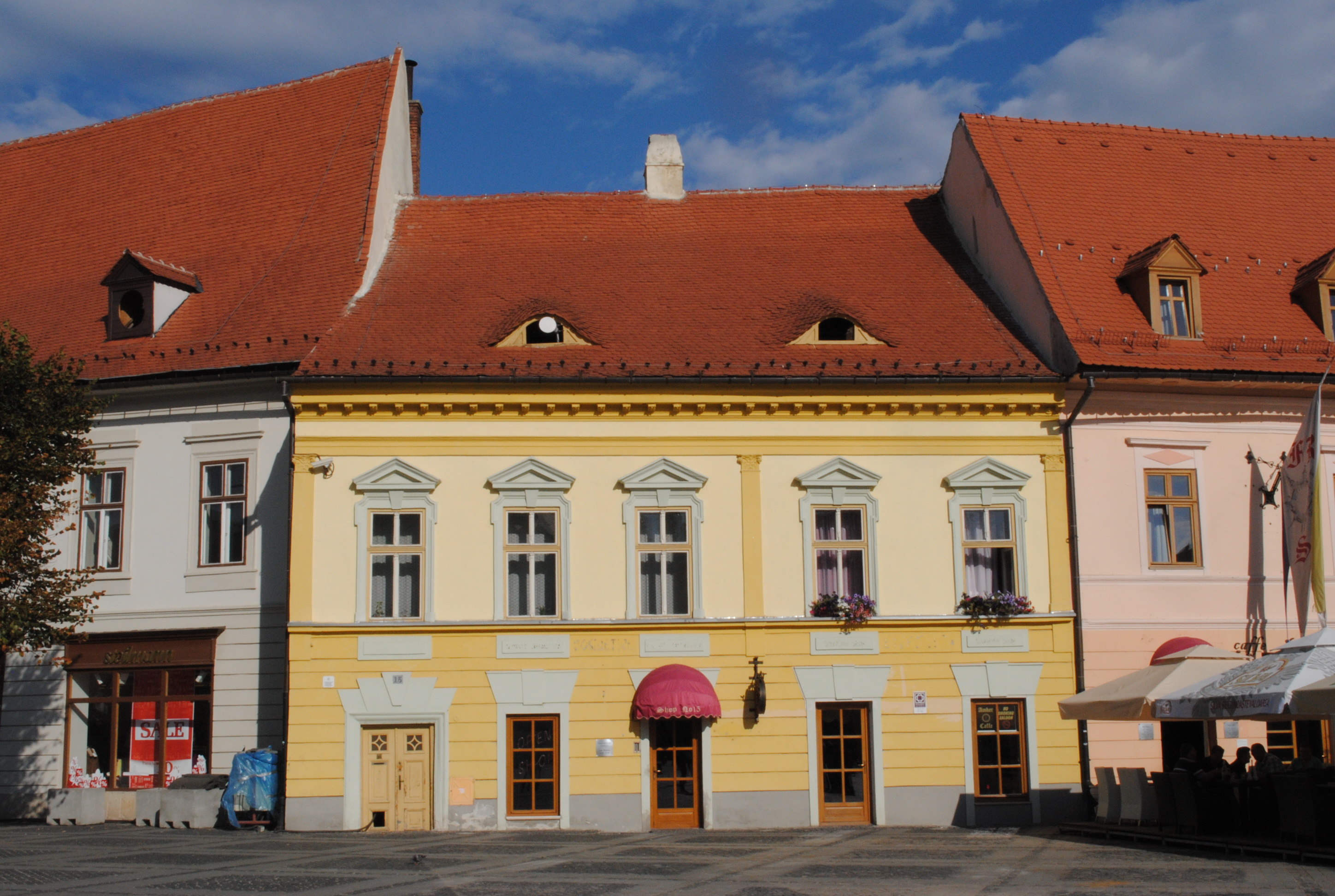 Casă, sec. XV - XIX